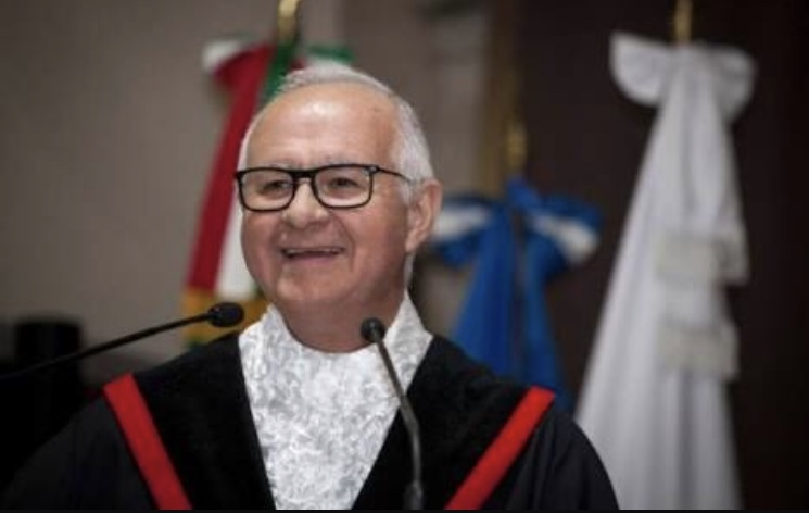 Rector